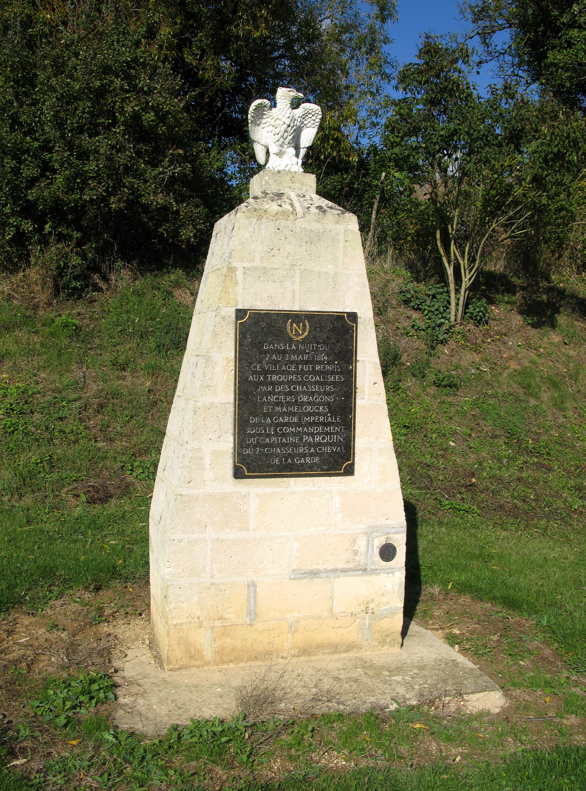 Oulchy-le-Château (Aisne, France) - Stèle du souvenir napoléonien. . .